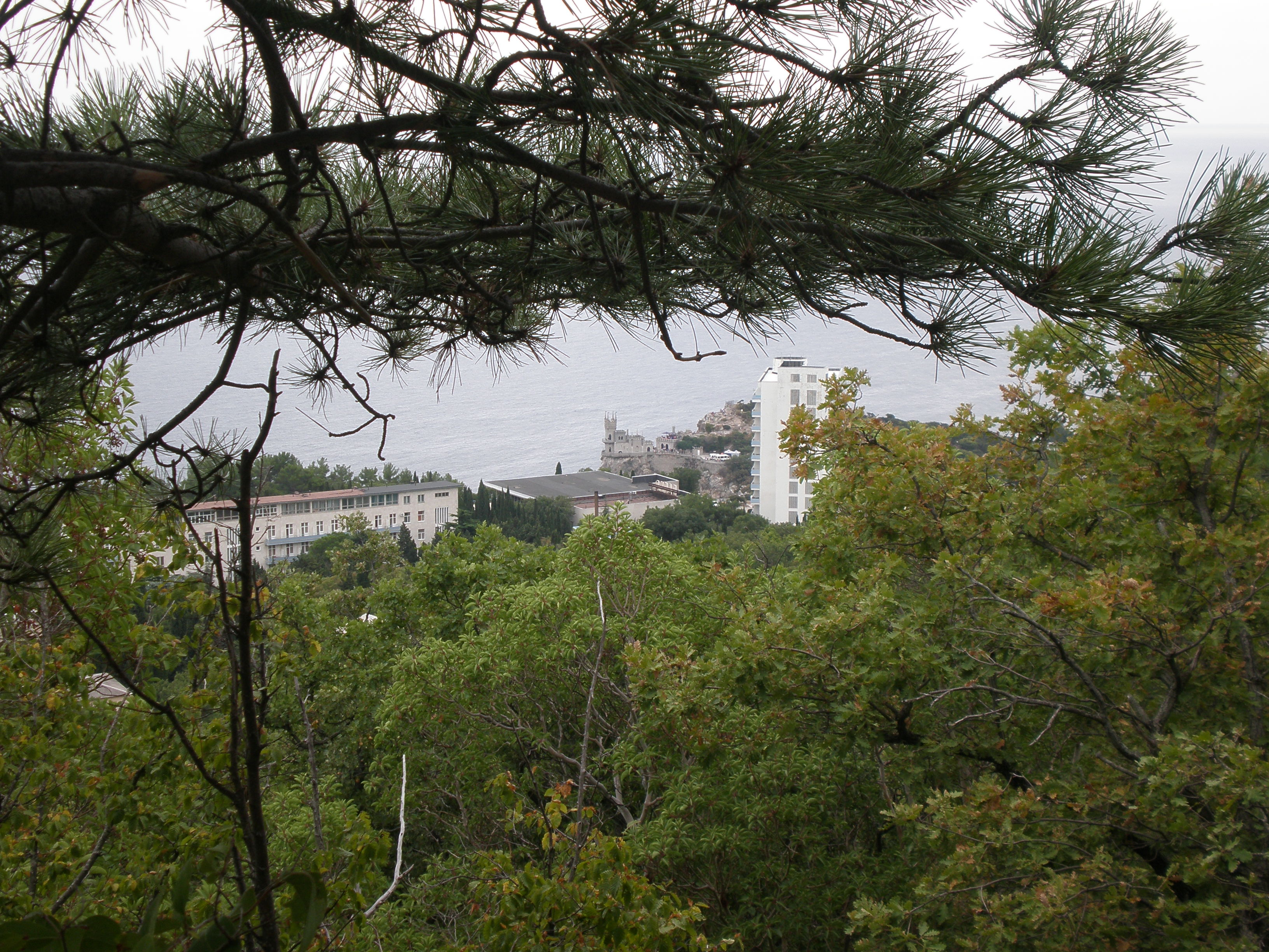 Мис Ай-Тодор, м. Ялта, сел. Гаспра